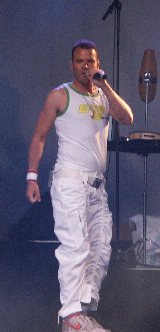 Andreas Lundstedt, då Alcazar framträder på Stora Torget i Borås